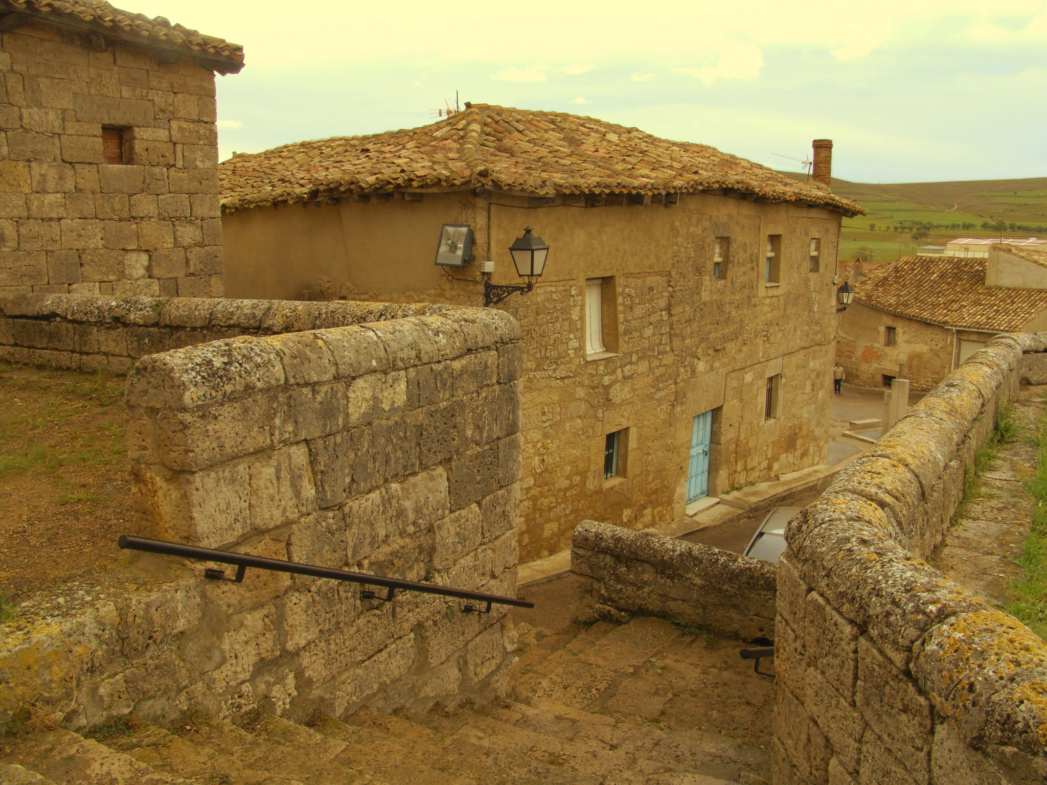 Castrillo de Murcia, arquitectura popular, piedra de sillería y adobe, Sasamón, Burgos, España.